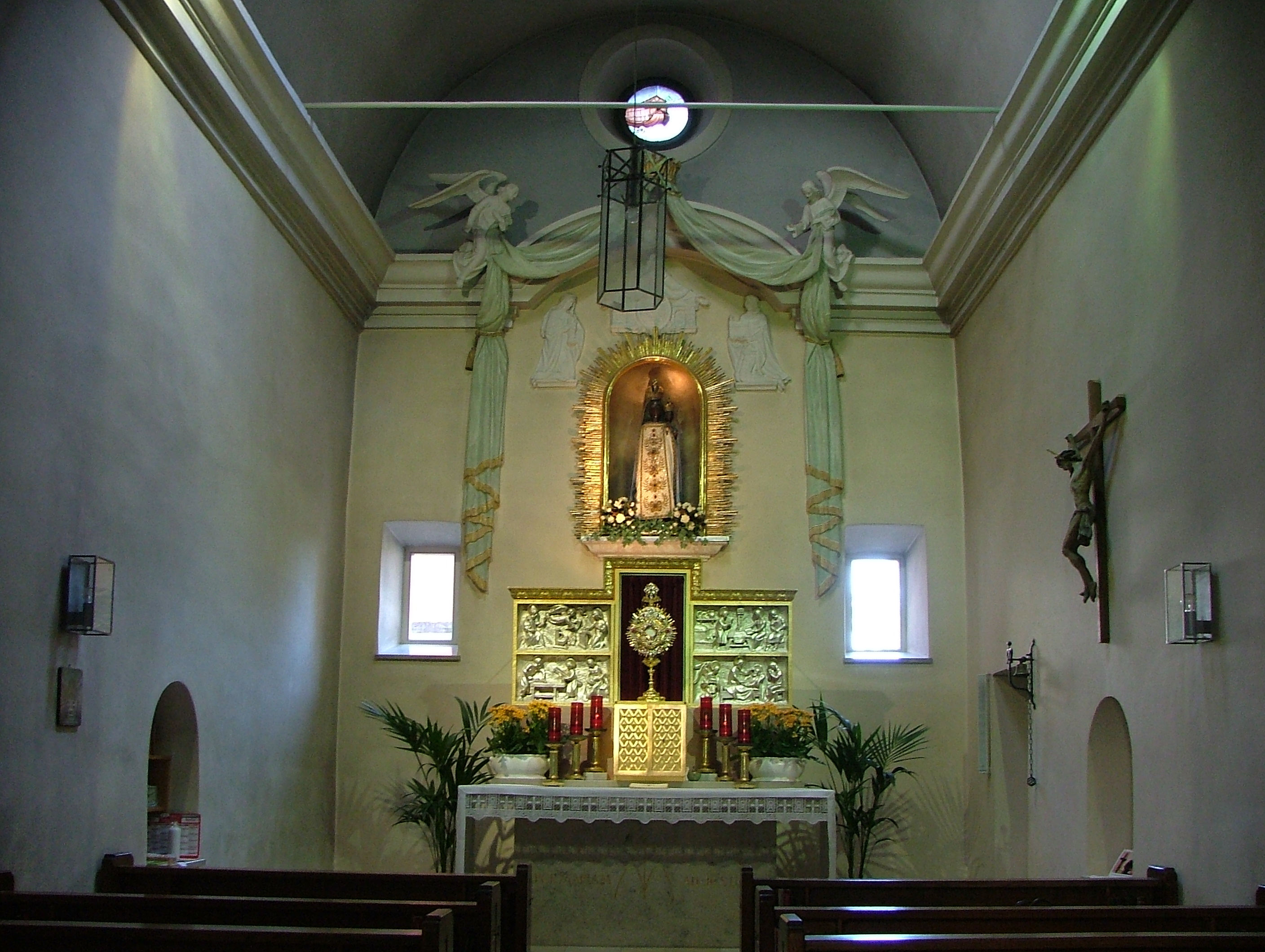 Loretokapelle